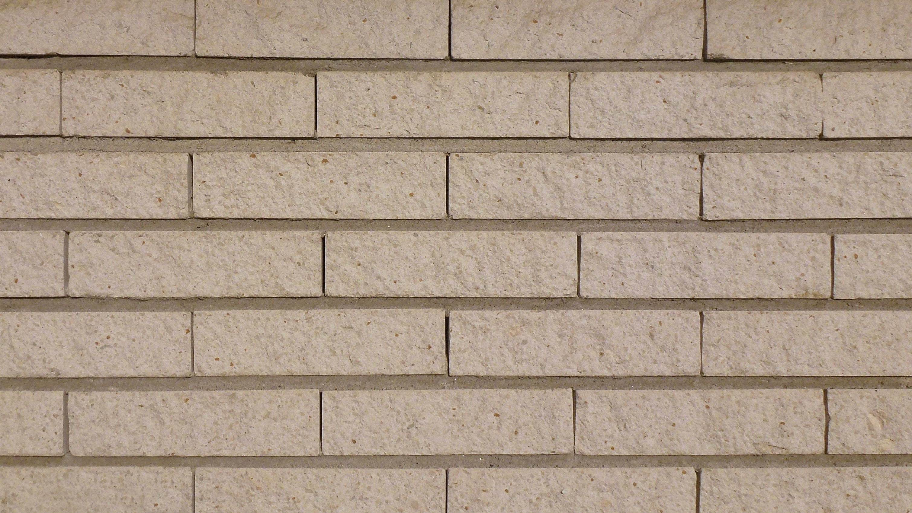 Fasad av släthuggen, vit Mexisten